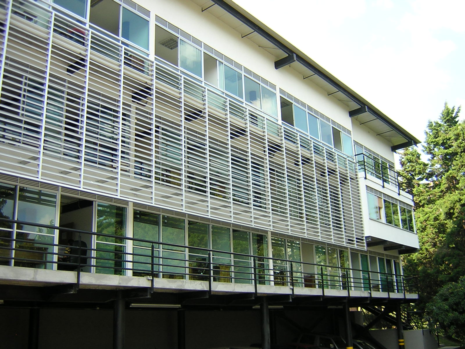 bloque M8, Facultad de Minas, Universidad Nacional de Colombia sede Medellín. Colombia